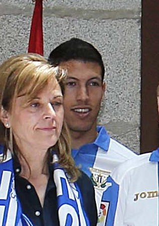 Felicidades pepineros!! Vuestro ascenso a Primera es la historia de un sueño, el resultado de vuestro trabajo y esfuerzo. Sois un orgullo para todo Madrid! Enhorabuena CD Leganés. #LeganésEsDePrimera